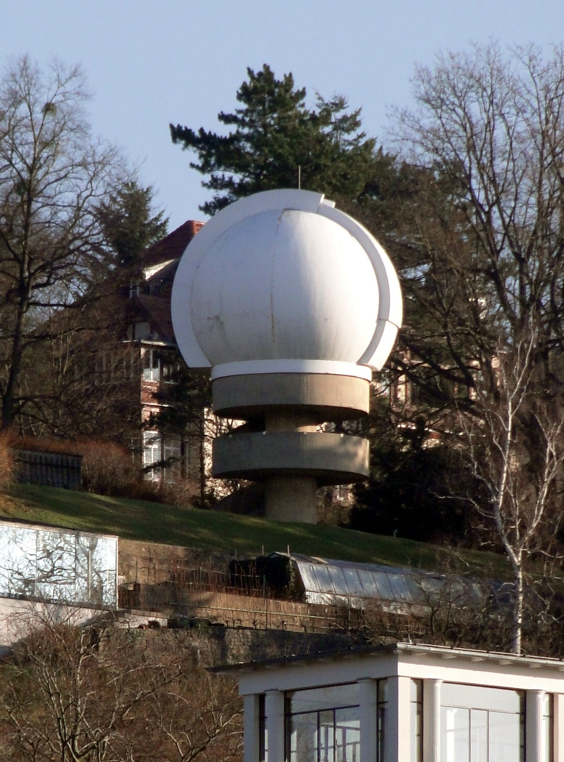 Sternwarte des Forschungsinstituts Manfred von Ardenne in Dresden, von der anderen Elbseite aus aufgenommen